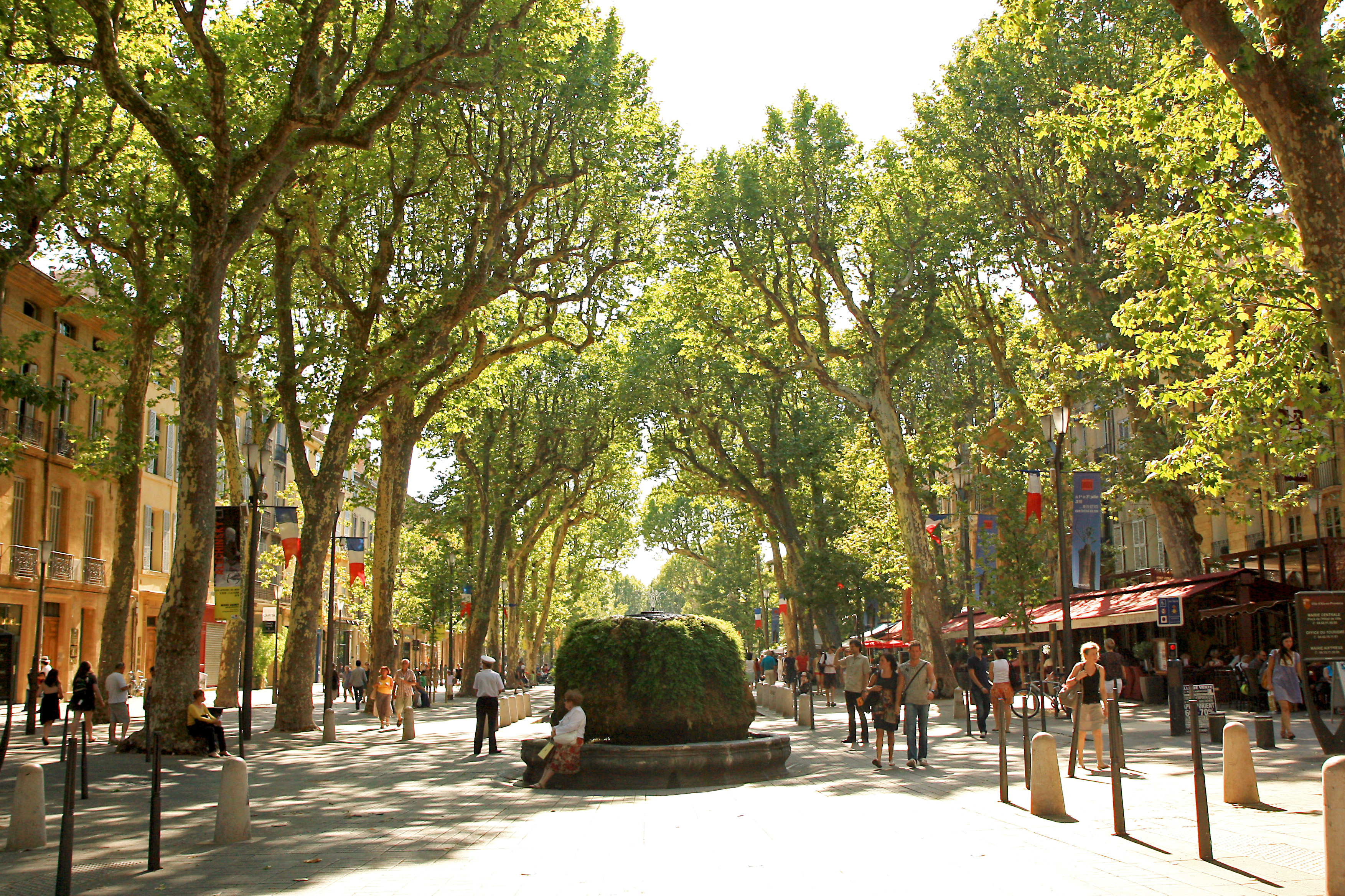 Cours Mirabeau, Aix-en-Provence (France).